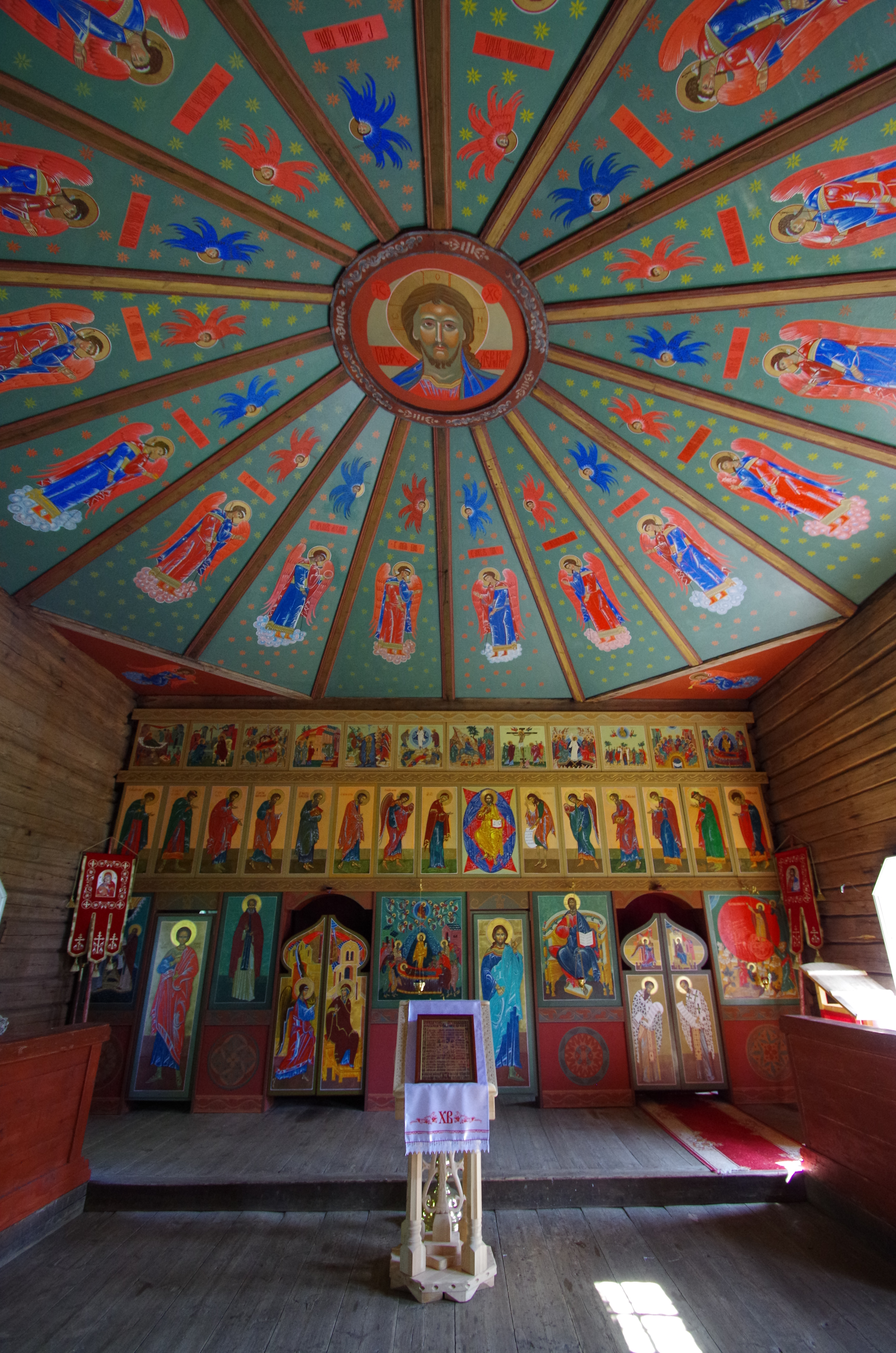 Итерьер - Церковь Илии Пророка на Ильинском Погосте (Колгостров)